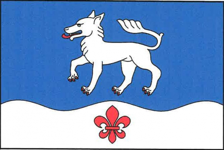 vlajka, Vlčeves, okres Tábor